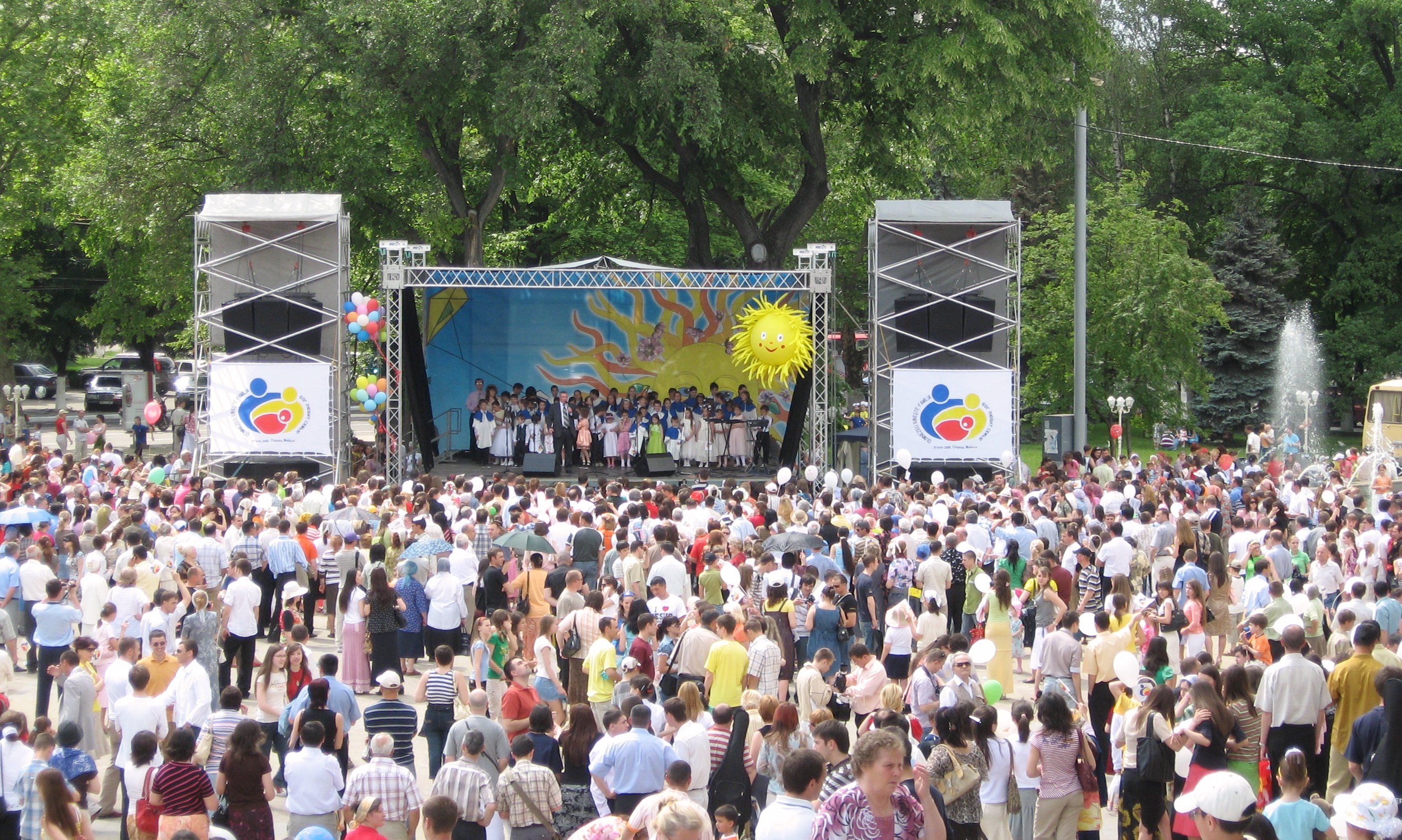 День Семьи в Кишинёве (2008 год)